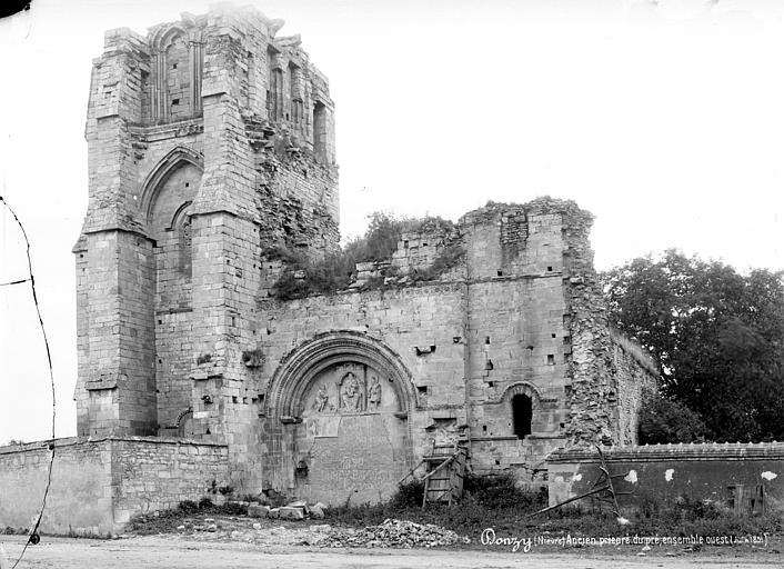 Façade ouest de l'église Notre-Dame-du-Pré de Donzy par Mieusement.